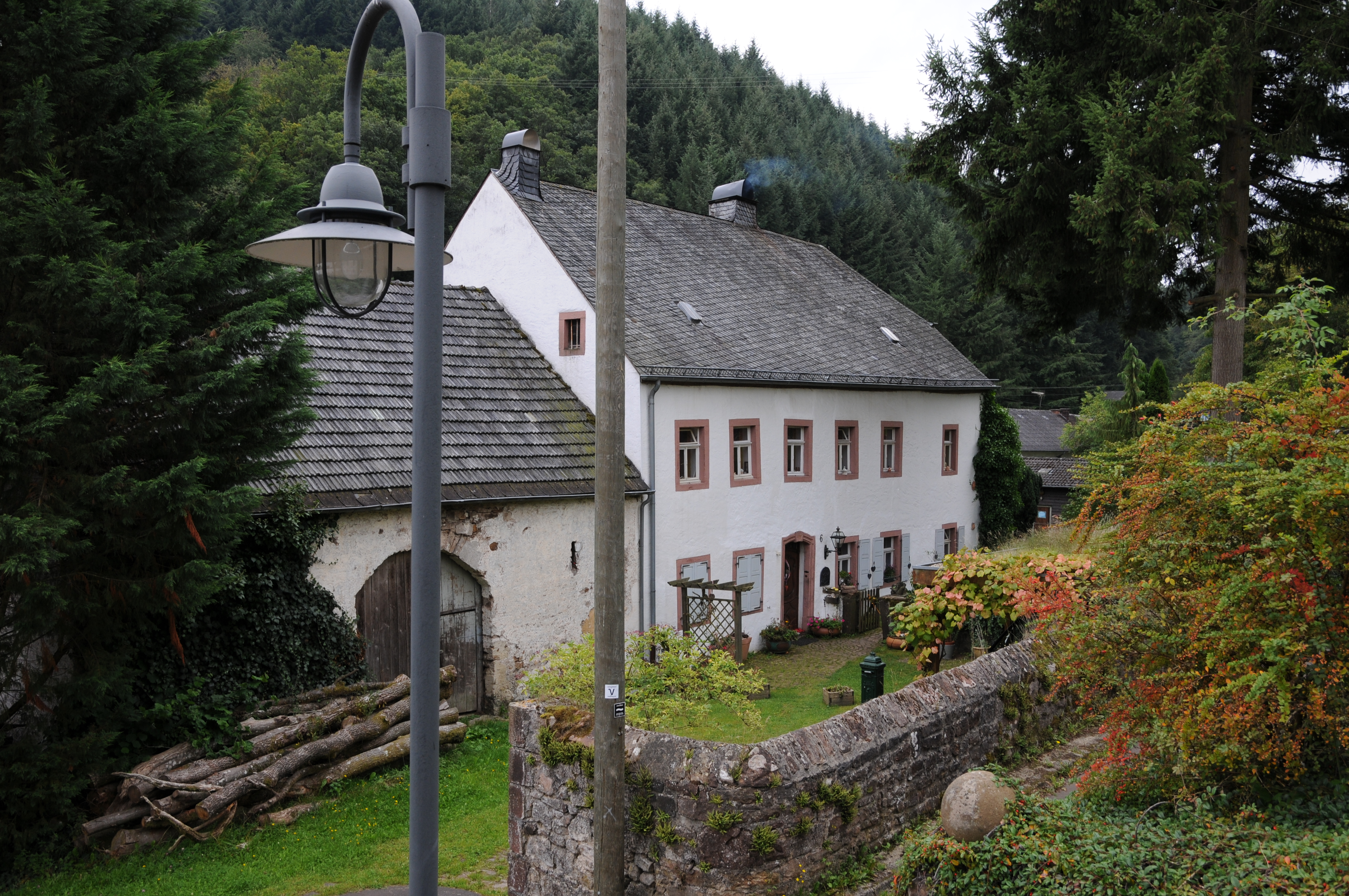 Vulkanweg 6, Meerfeld: ehemaliges Pfarrhaus; sechsachsiger Putzbau, bezeichnet 1807